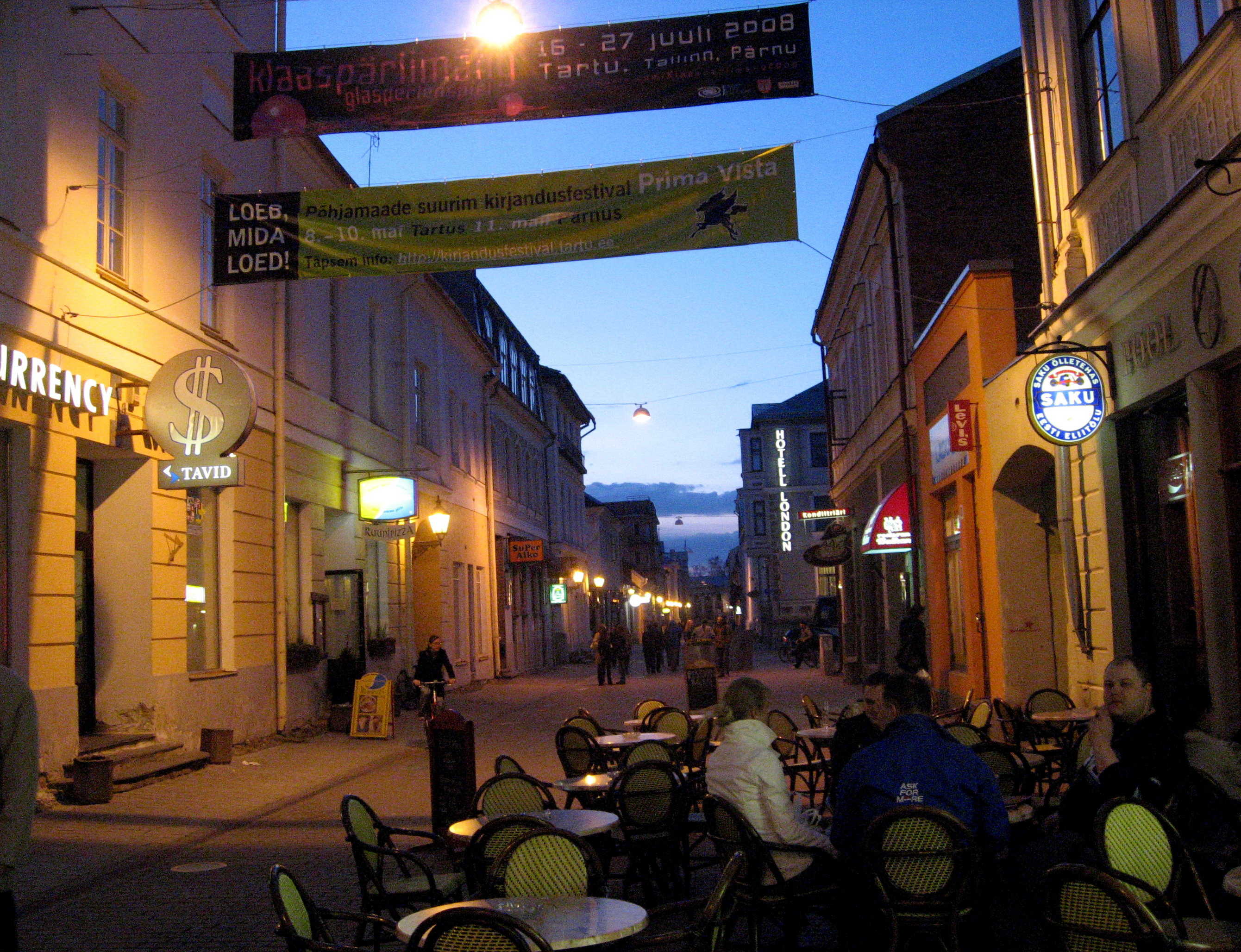 Tartu